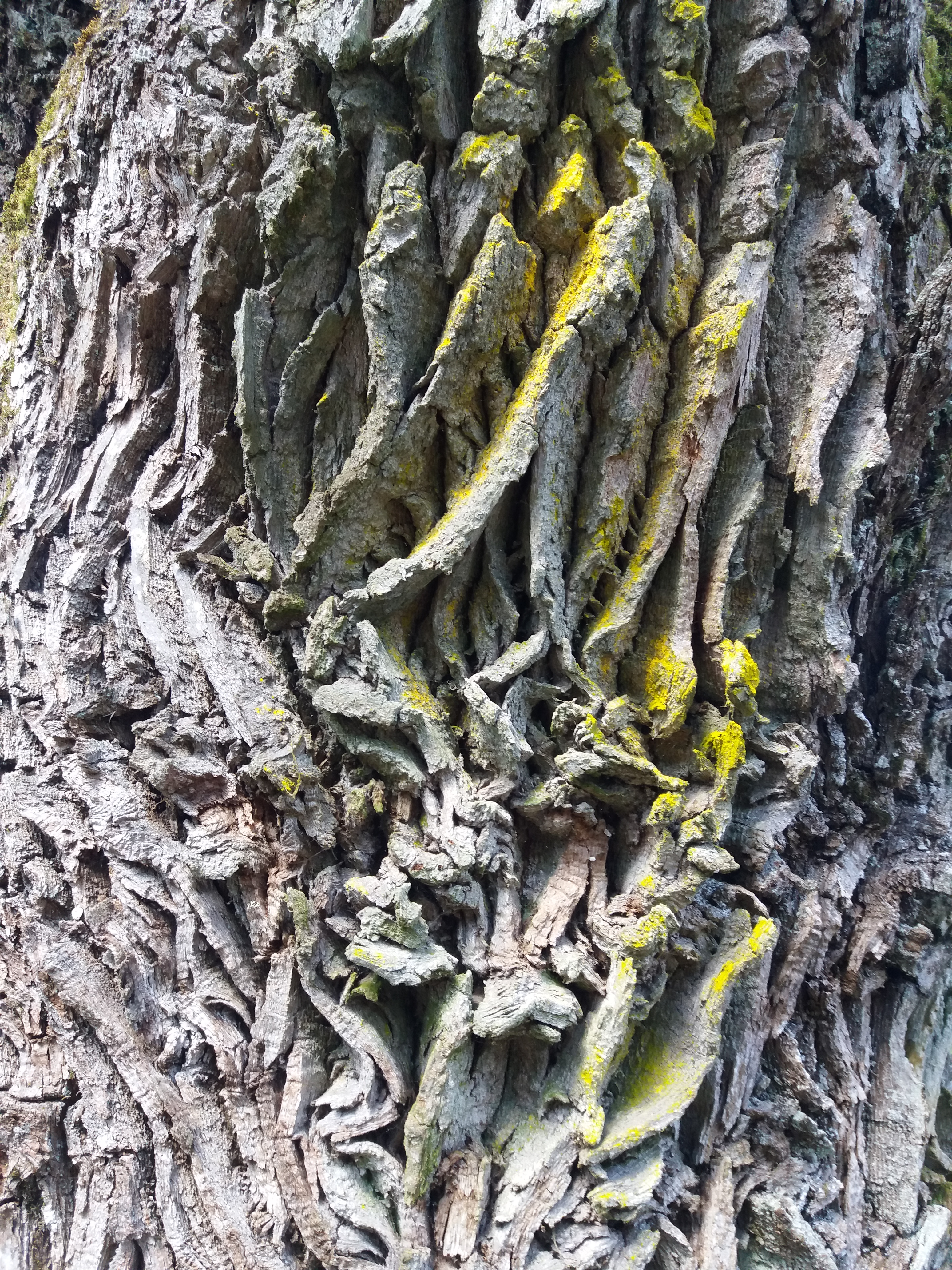 Upsi tamm